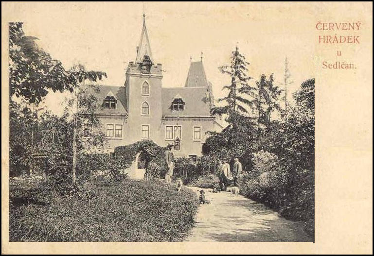 Zámek Červený Hrádek u Sedlčan